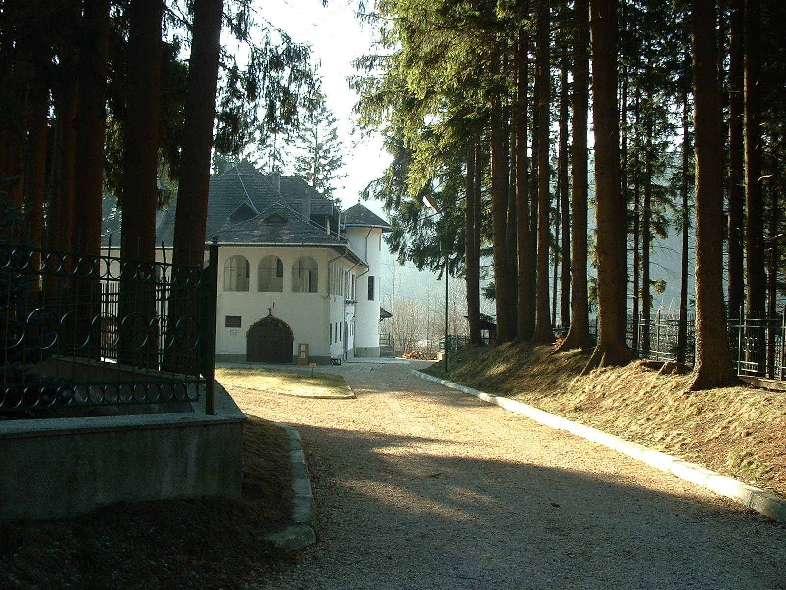 casa memoriala G. Enescu de la Cumpatu